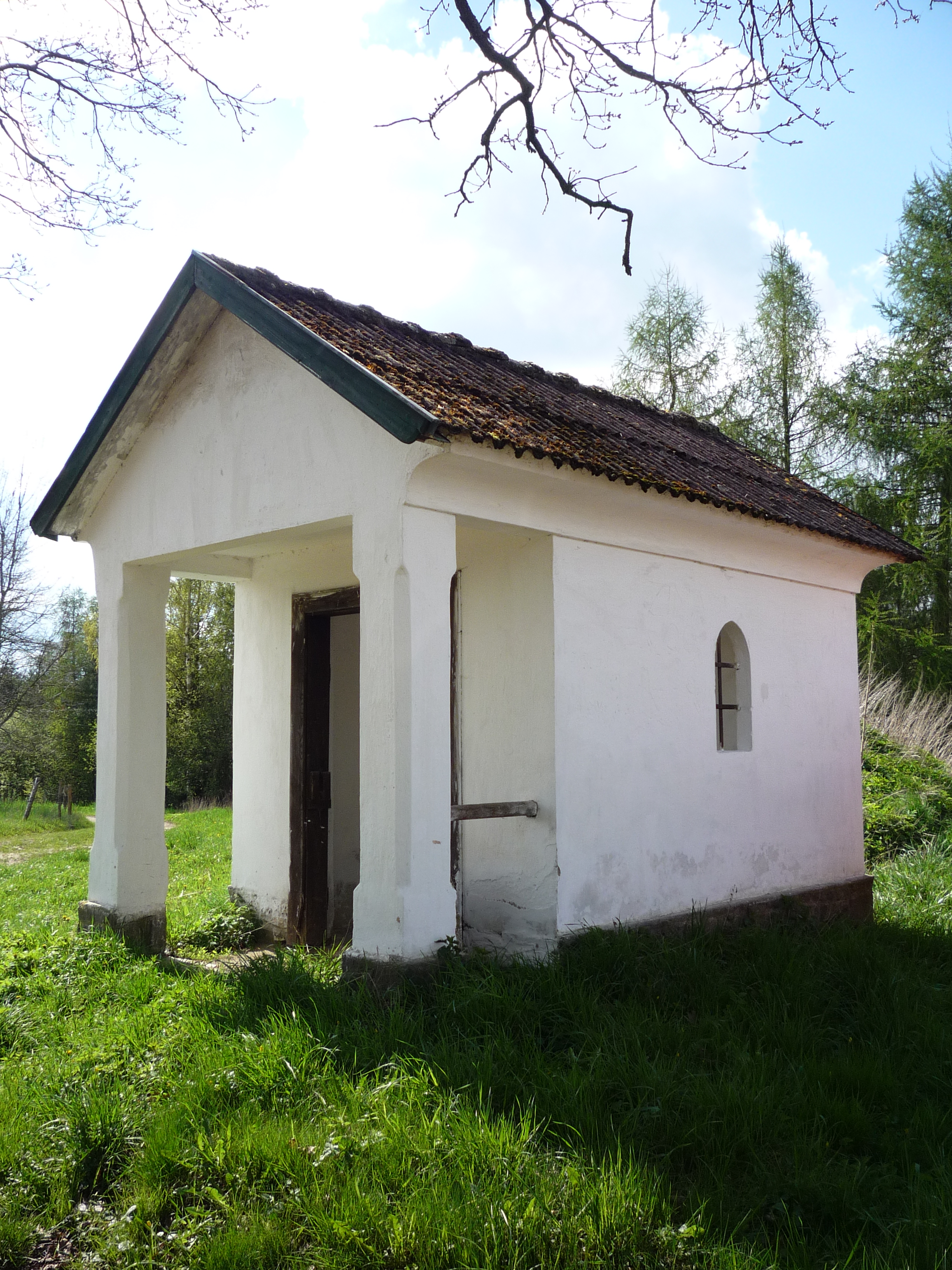 Autor fotografie Jiří Zelenka. Kaplička paní Bergrové. Ulice U Vítků. Havlíčkův Brod.